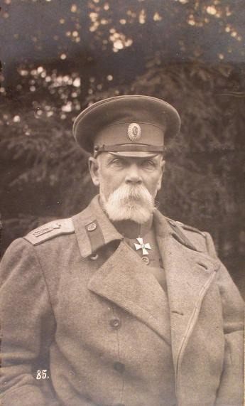 Командующий XII армией генерал от инфантерии В. Н. Горбатовский